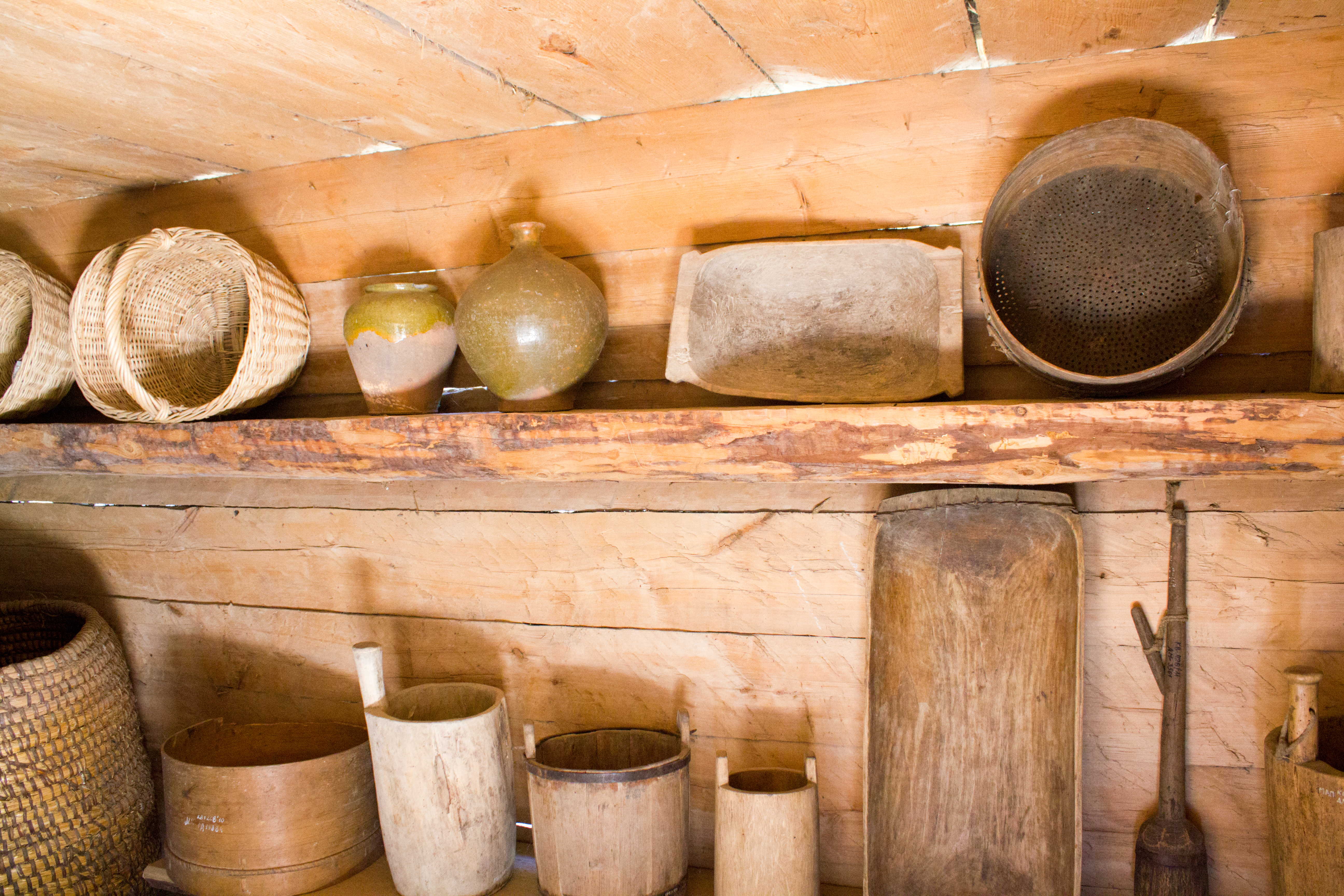 Хата з села Таборів Сквирського району Київської області, Київ, Пирогів